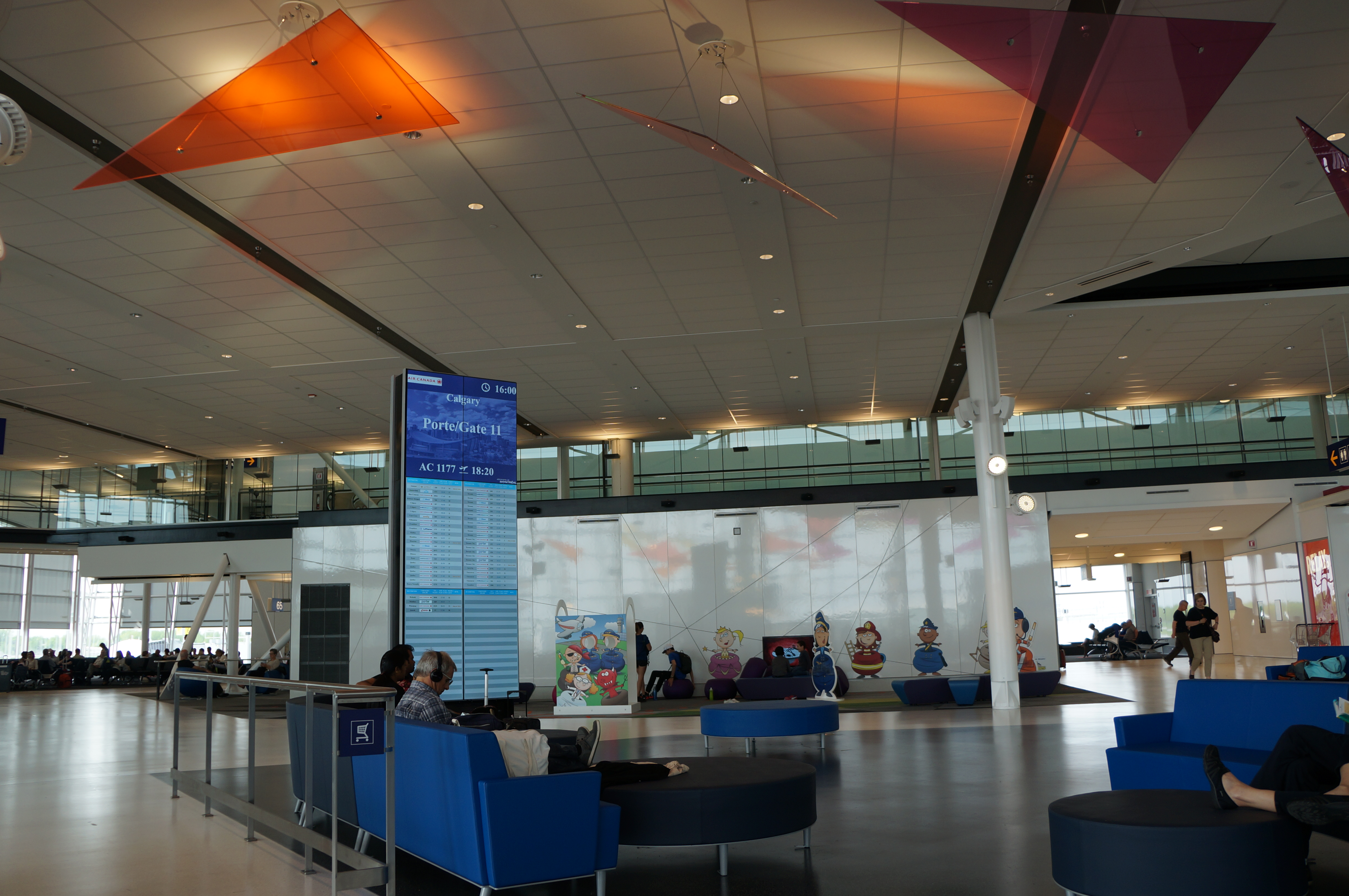 nouvelle aire d'attente près des 4 nouvelles portes d'embarquement inaugurées le 10 mai 2016.